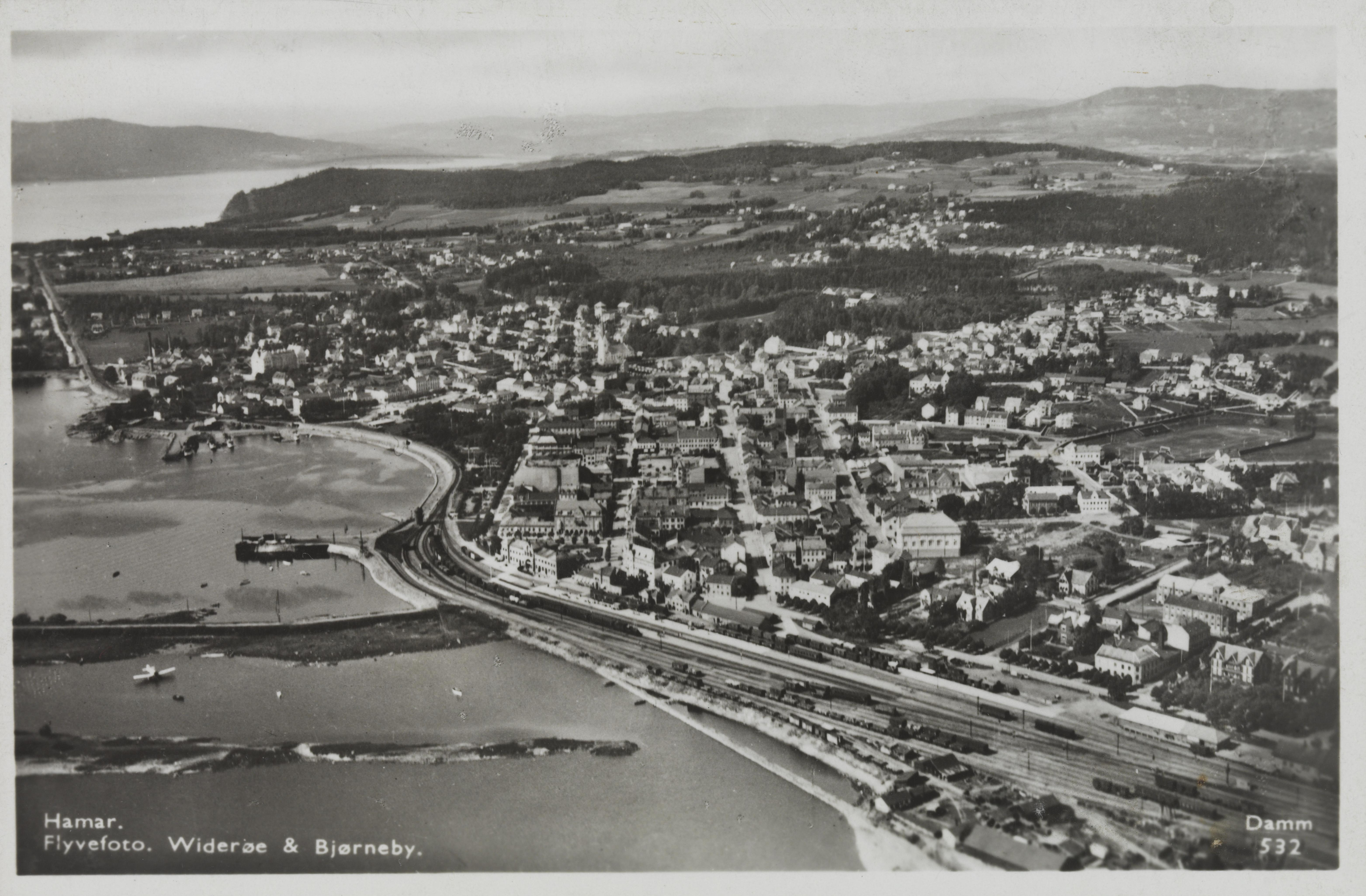 Bildet er hentet fra Nasjonalbibliotekets bildesamling Hamar, Hedmark